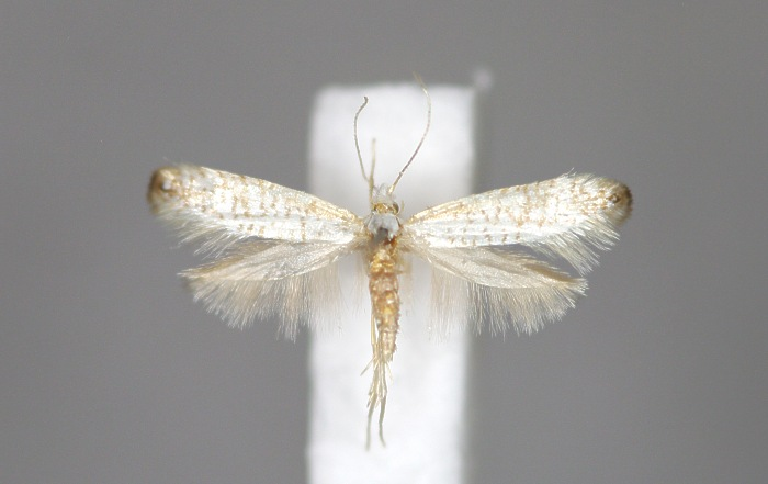 Argyresthia retinella